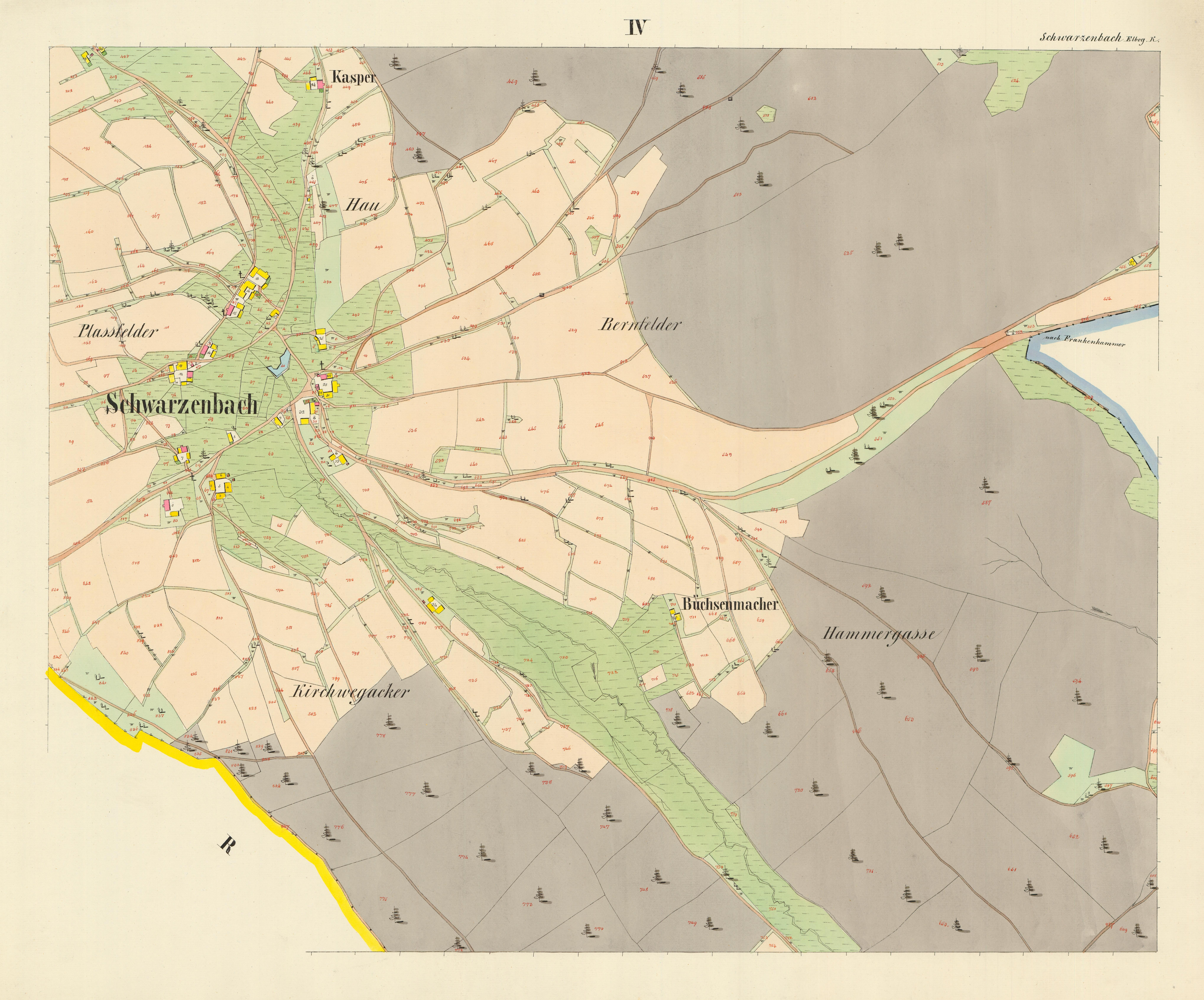 Hauptteil der früheren Gemeinde Schwarzenbach (heute Černá u Kraslic), Landkreis Graslitz (heute Stadt Kraslice), Böhmen